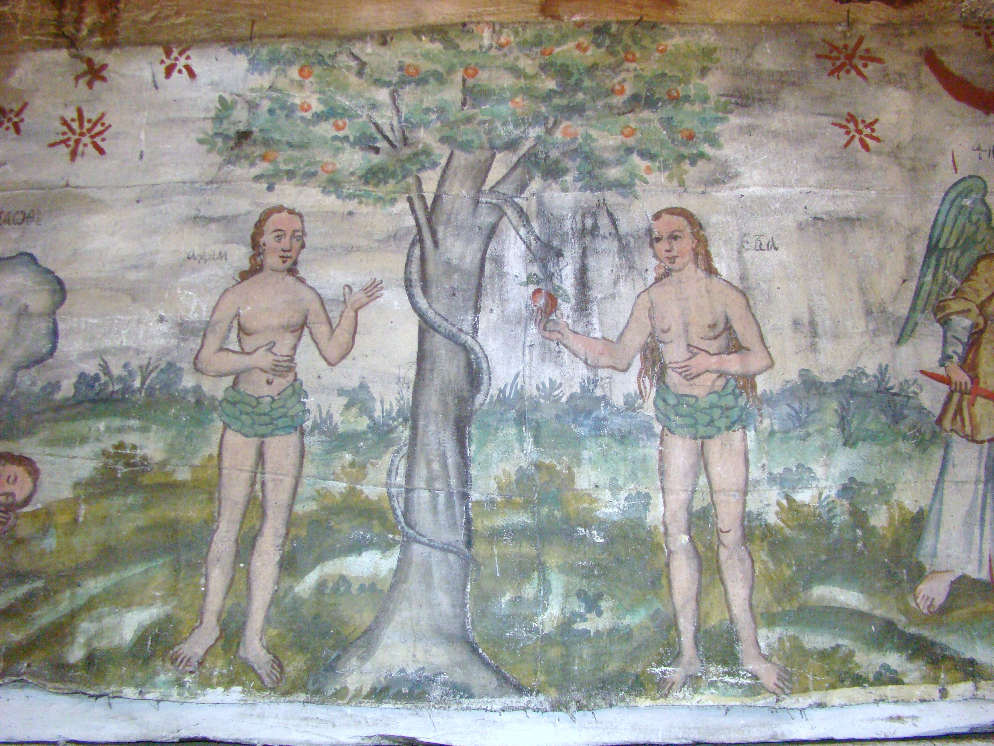 Biserica de lemn "Sfinții Arhangheli Mihail şi Gavril", sat PLOPIŞ; comuna ŞIŞEŞTI